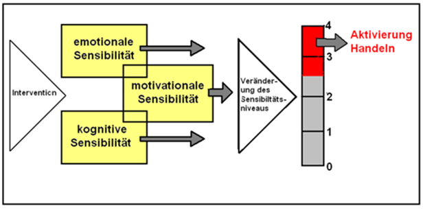 Kategorien